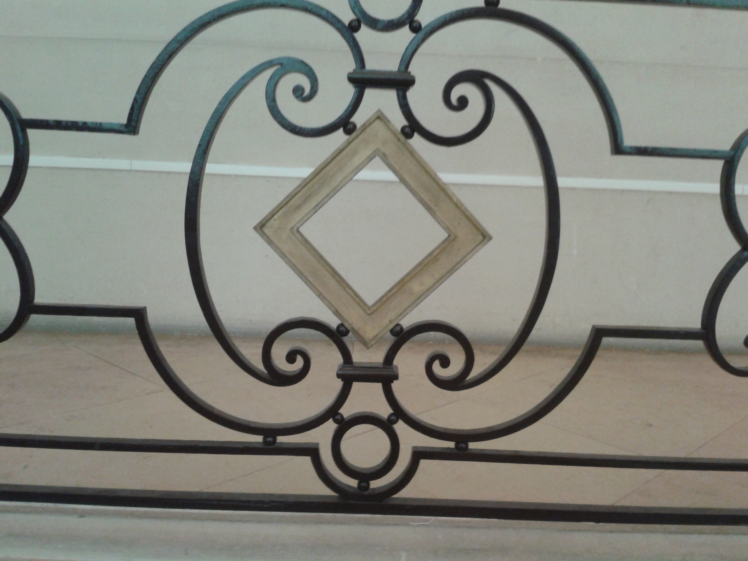 Balustrade en fer forgé de l'escalier de l'hôtel de Rohan, rue Vieille-du-Temple à Paris. Le motif principal, en forme de losange, rappelle les macles qui figurent dans les armoiries de la famille de Rohan